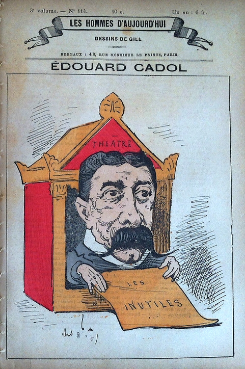 Édouard Cadol, caricature d'André Gill pour le n°114 Les Hommes d'aujourd'hui.